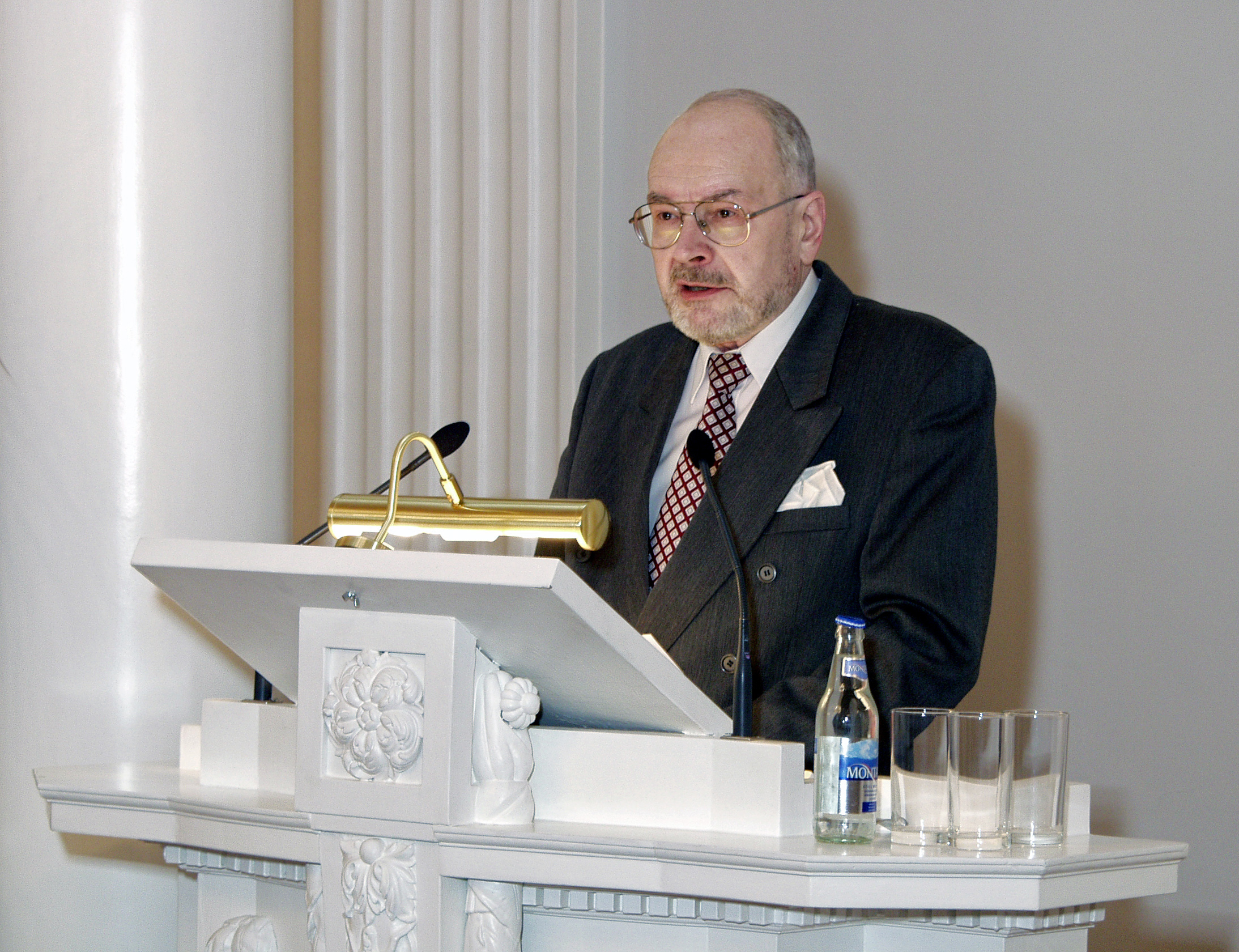 TÜ uurali keelte professor Ago Künnap esinemas ettekandega "Paul Ariste elu ja looming" 3. veebruaril 2005 Tartu Ülikooli aulas toimunud mälestuskonverentsil keeleteadlase Paul Ariste 100. sünniaastapäeval.